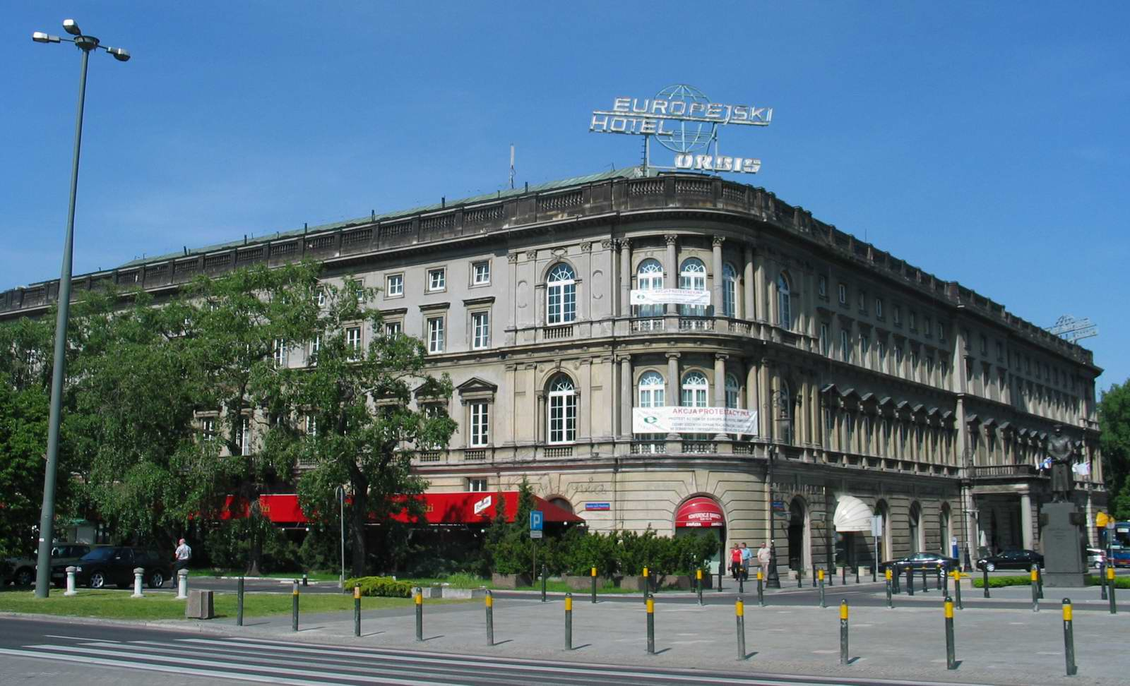 Hotel Europejski w Warszawie przy ul. Krakowskie Przedmieście 13, widok od strony Placu Piłsudskiego